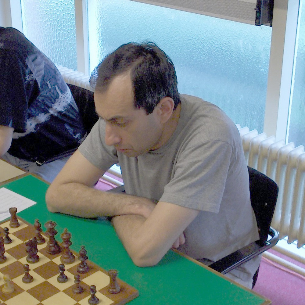 GM Alexander Berelovich, Bussum 2008